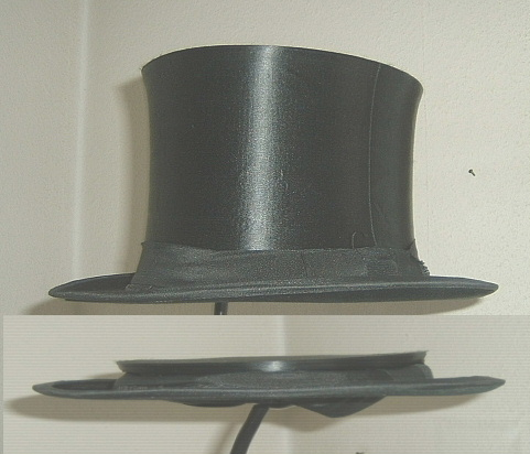 Chapeau claque von etwa 1920, unten geklappt, oben ausgefahren (Bild aus zwei Aufnahmen zusammengesetzt)